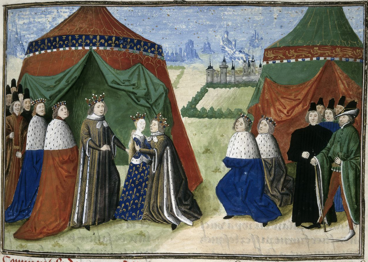 Richard II. Anglický s Isabellou a Karlem VI.